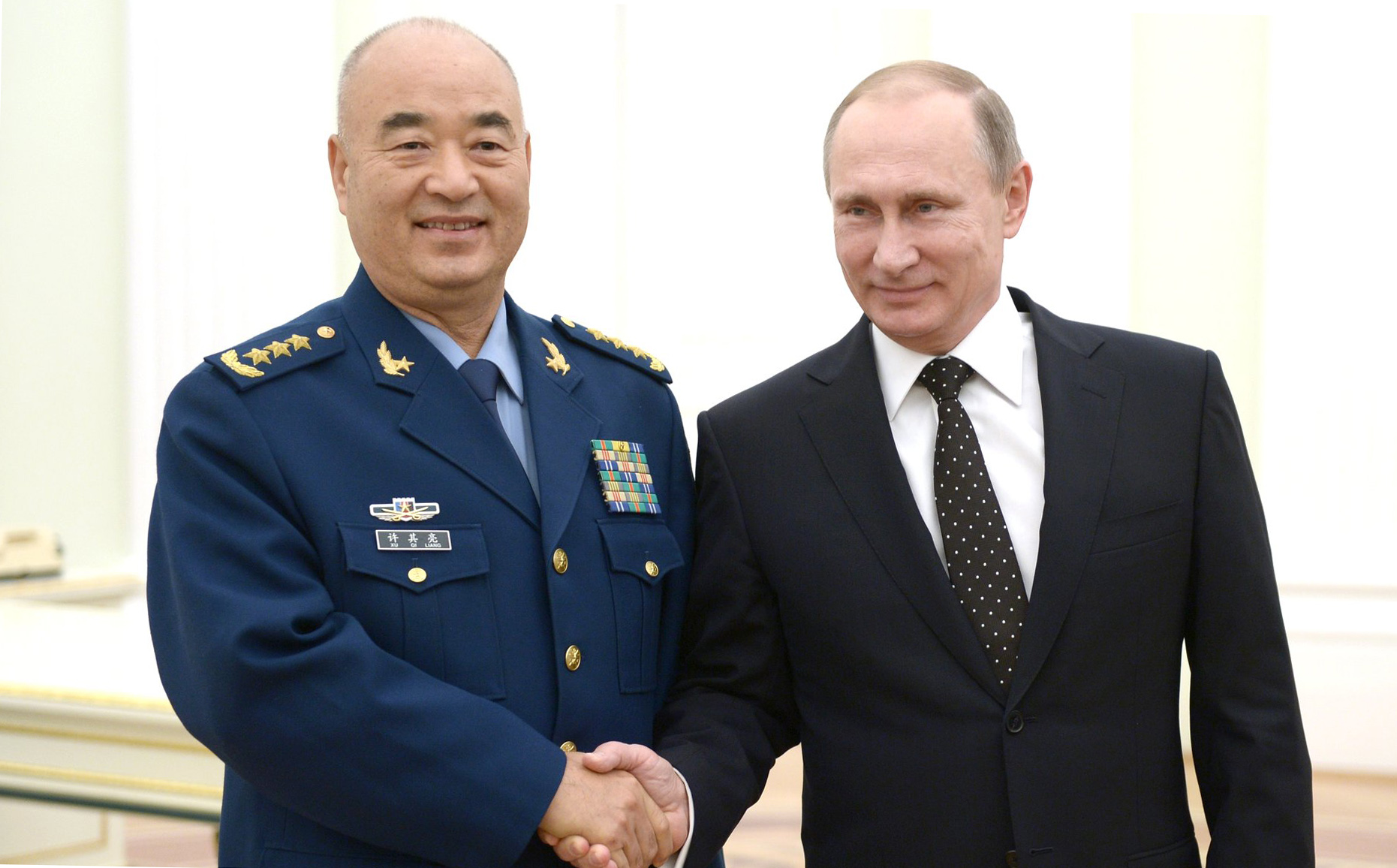 Встреча Президента России Владимира Путина с заместителем председателя Центрального военного совета Китайской Народной Республики Сюй Циляном